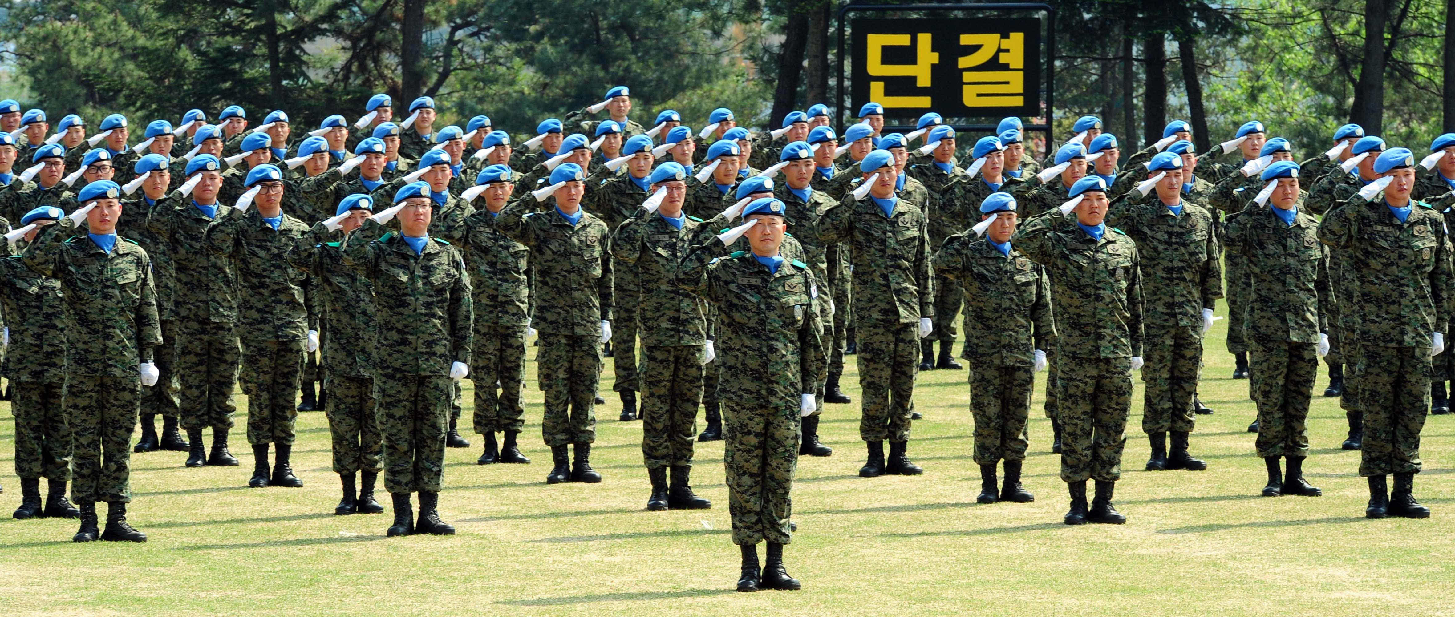 한빛부대 3진 파병 장병들이 지난 18일 오후 권오성 육군참모총장과 전임범 육군특수전사령관 등 관계자들이 참석한 가운데 육군특수전사령부 연병장에서 임석상관에 대한 경례를 하고 있다. 촬영 - 이헌구 기자